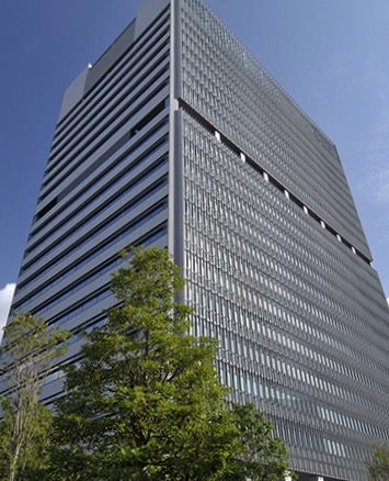 大崎フォレストビルディング